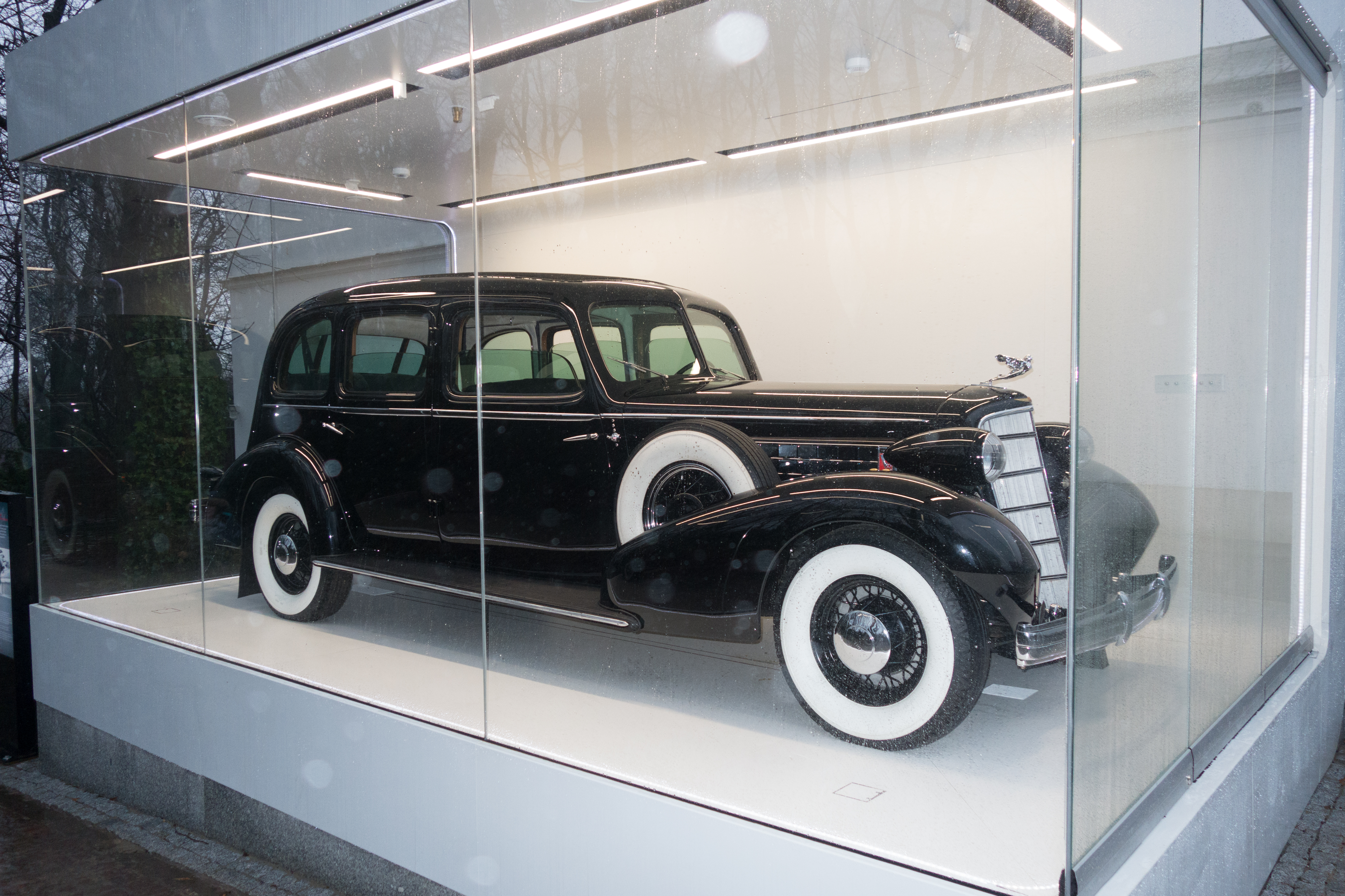 Warsaw 2015